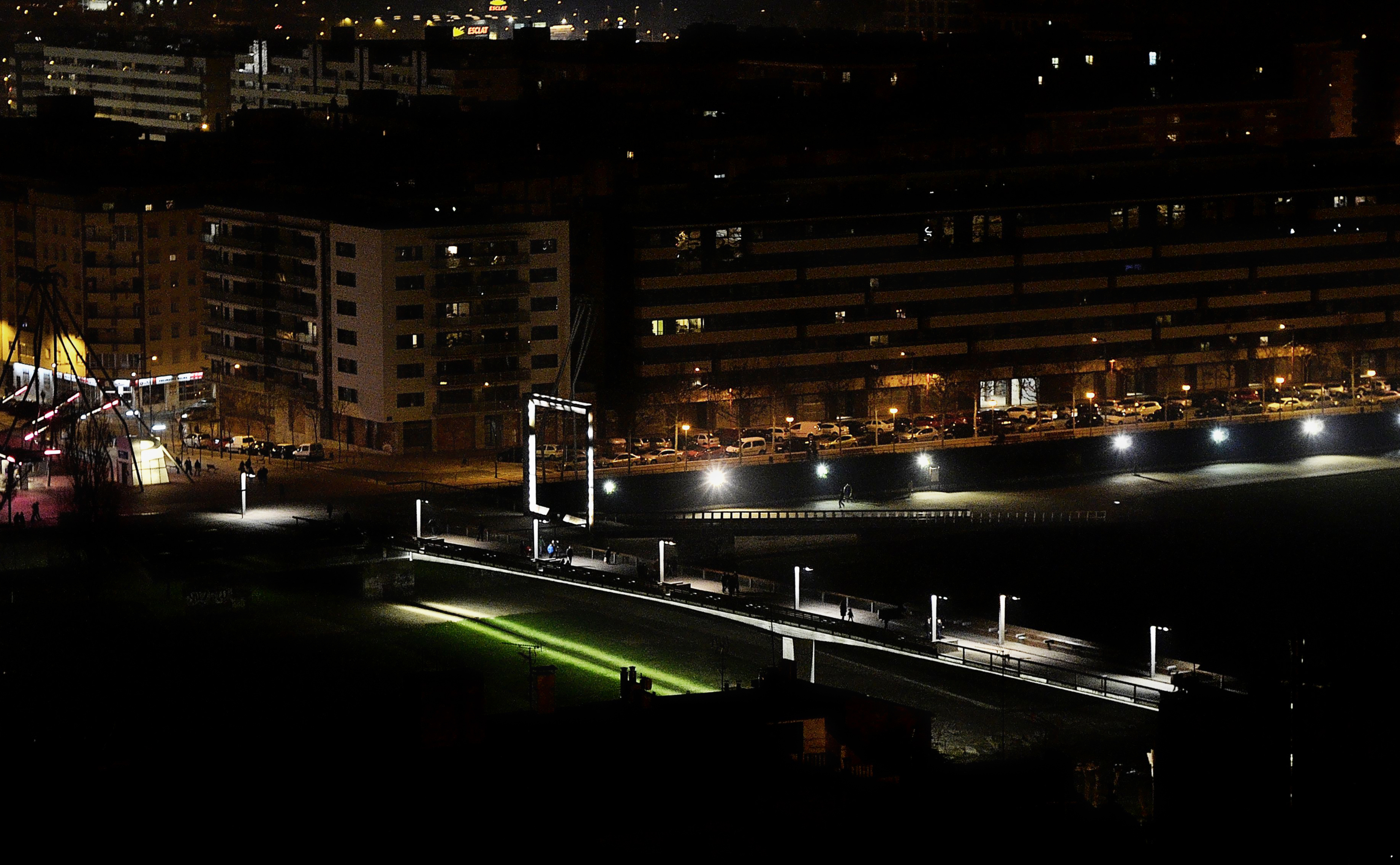 La pasarela del Liceo Escolar comunica el barrio de Cappont con el centro de Lleida.